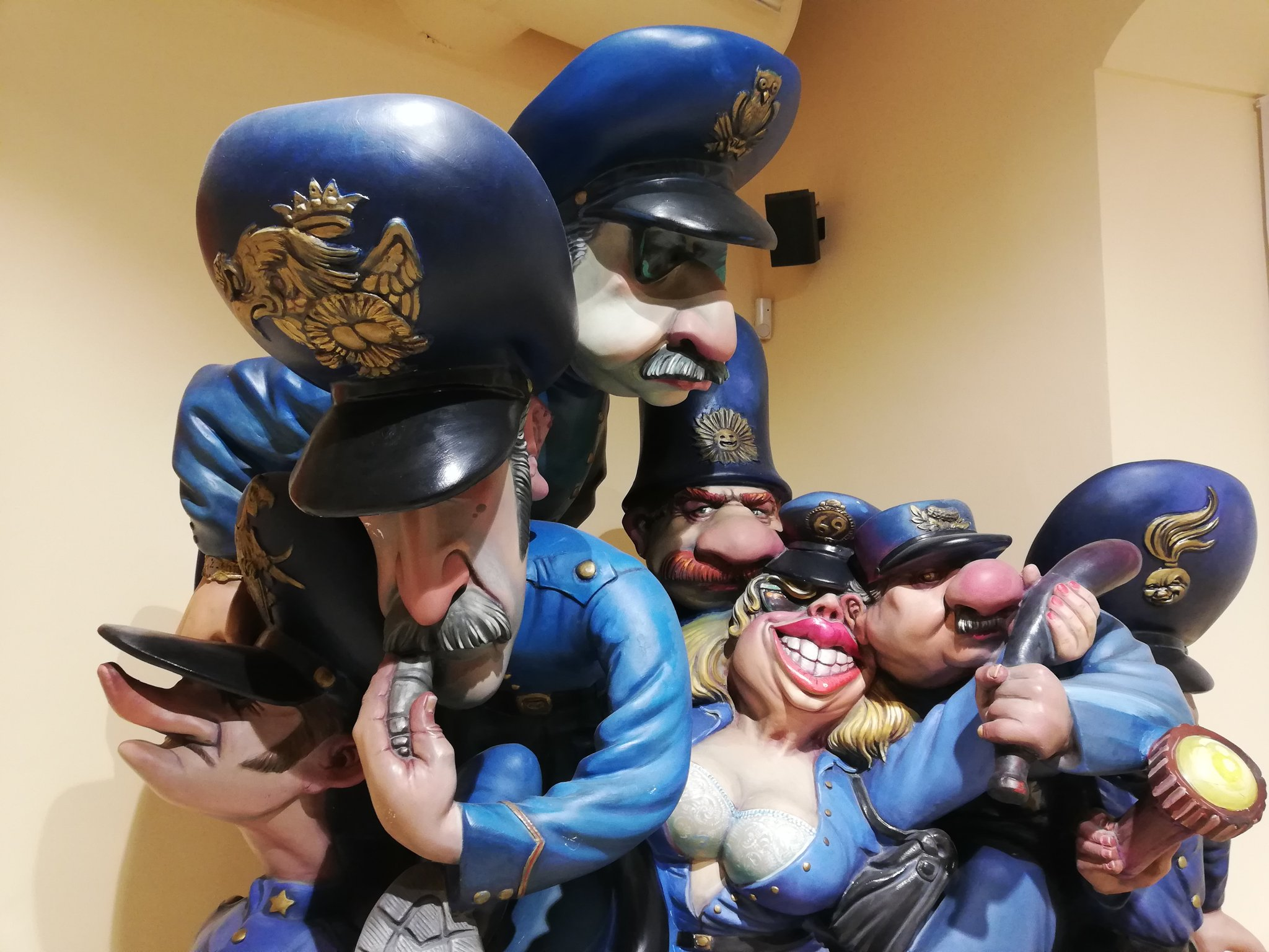 Ninot indultat de les Falles de València 1995, obra de Miguel Santaeulalia Núñez dins de la Falla plantada a Na Jordana amb lema "Ací és Hollywood"